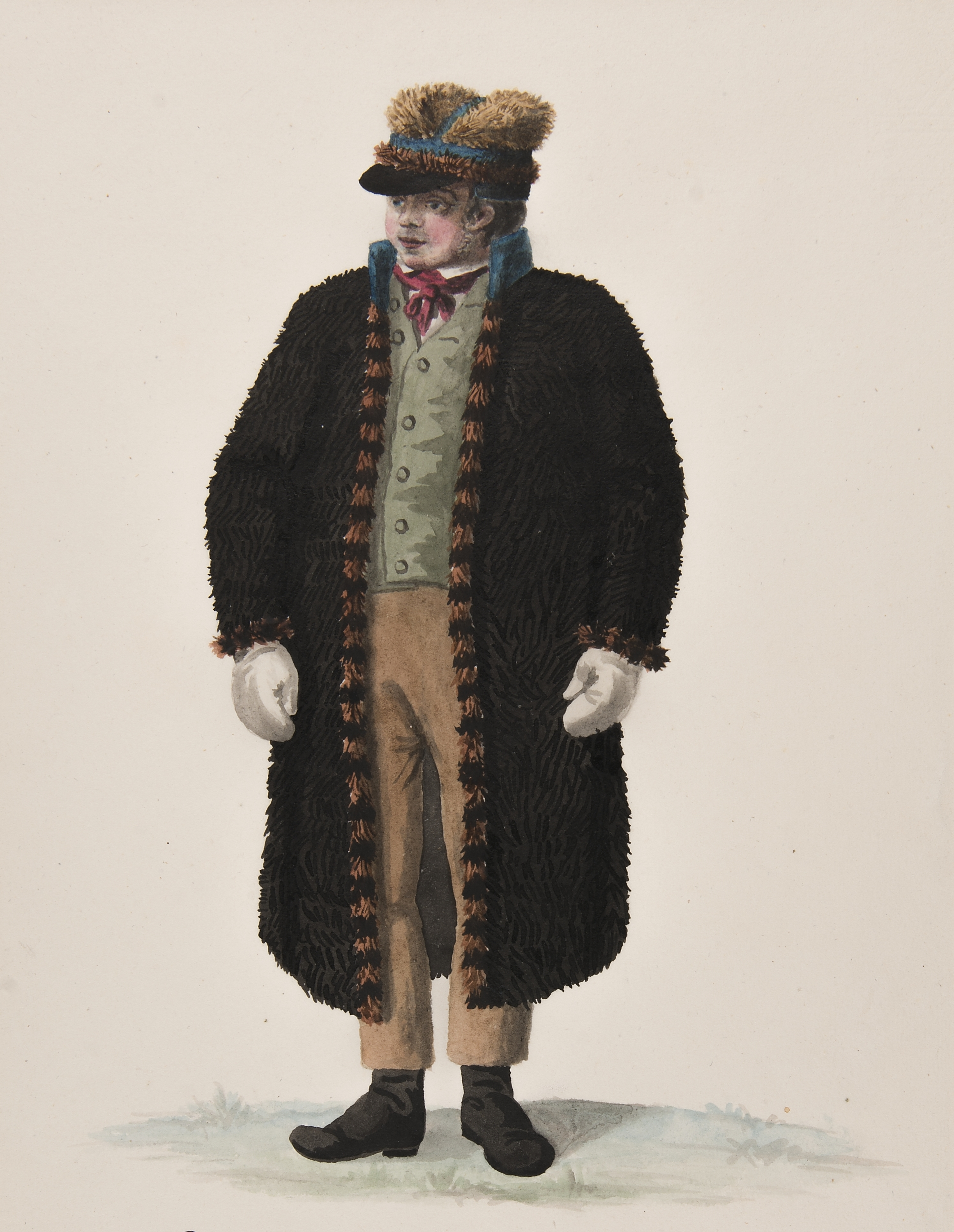 "Habitant de la Helsingland" Man i päls. Akvarell av C. W. Swedman. Depicted place: Sweden (Q34) (Land), Hälsingland (Q206564) (Landskap)